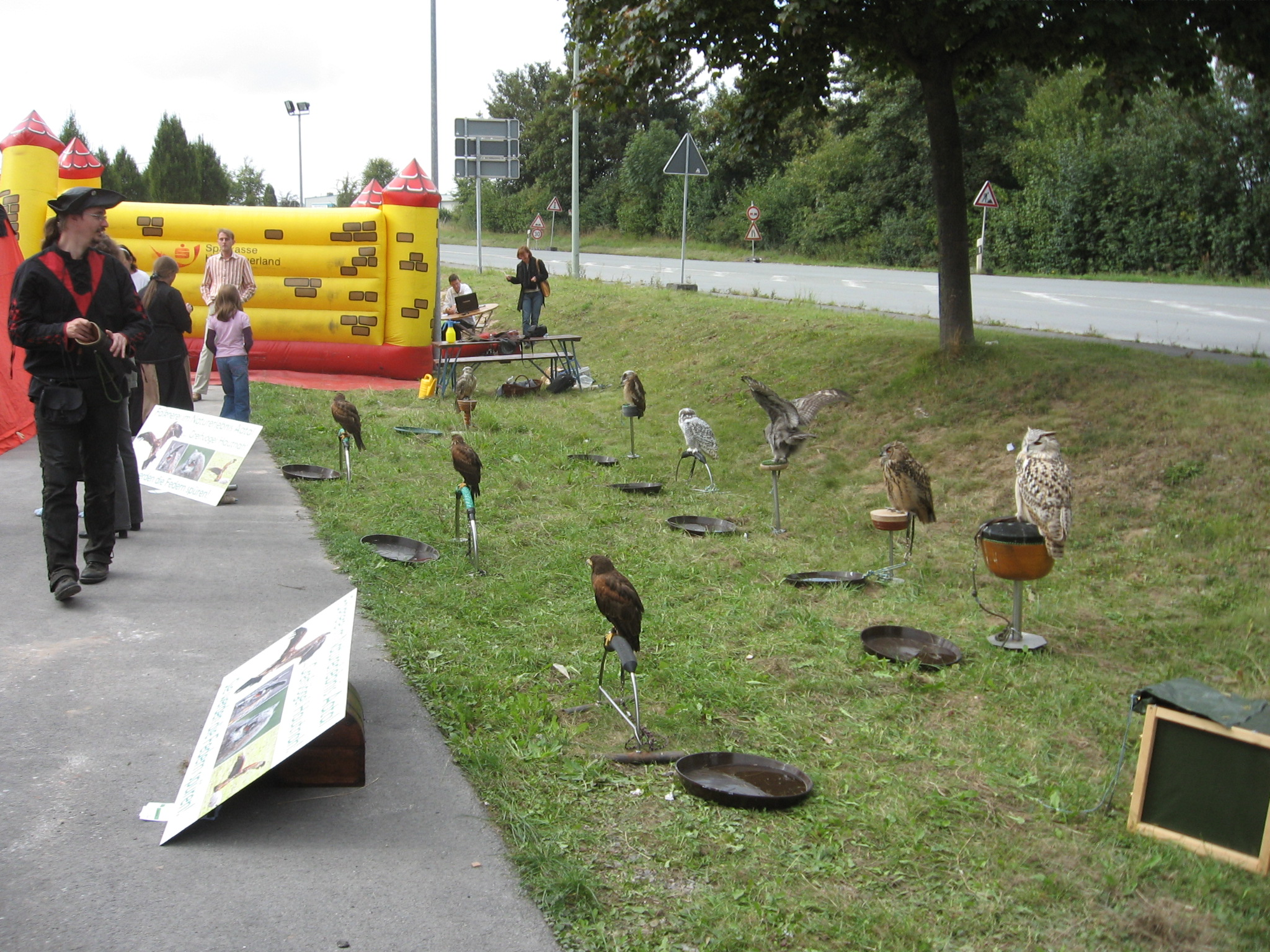 Falkner mit Greifvogelschau beim Jubiläum des Autohauses Biederbick in Brilon, NRW, D.. Vögel auf Rasenstreifen zwischen Parkplatz (links) und Bundesstraße 7 (rechts). Dahinter Hüpfburg für Kinder.